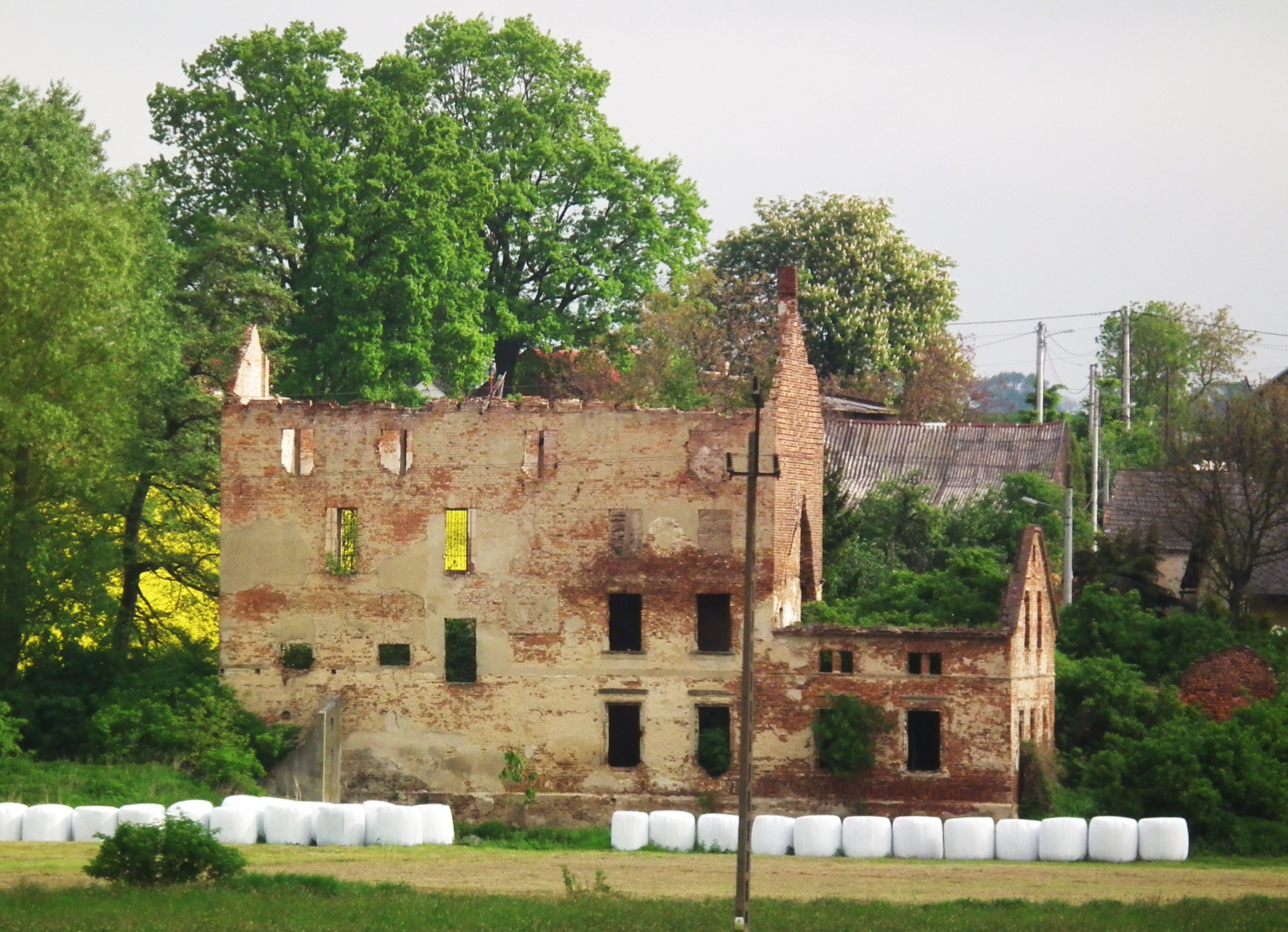 Maków (woj. śląskie). Ruiny młyna.